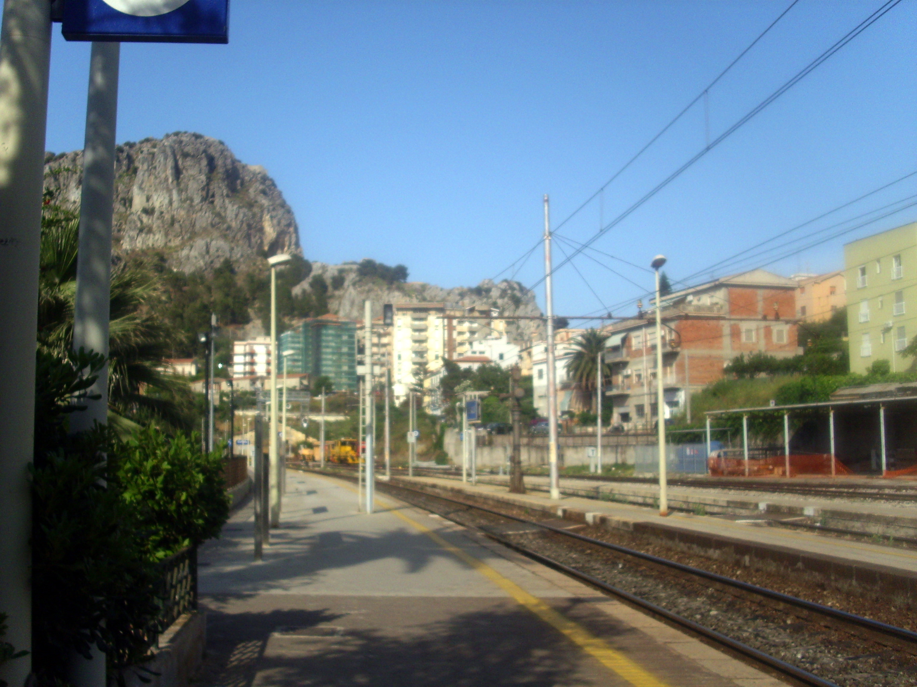 Stazione ferroviaria di Cefalù